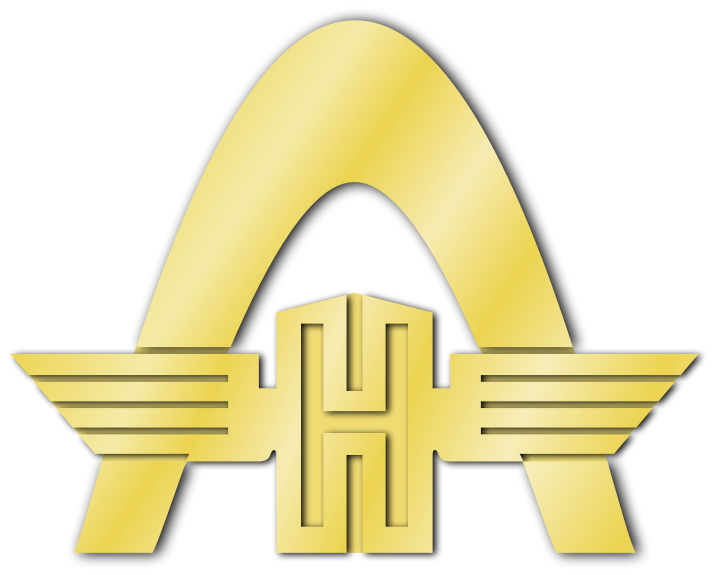 Hanomag-Logo nach Übernahme der Rheinstahl-AG